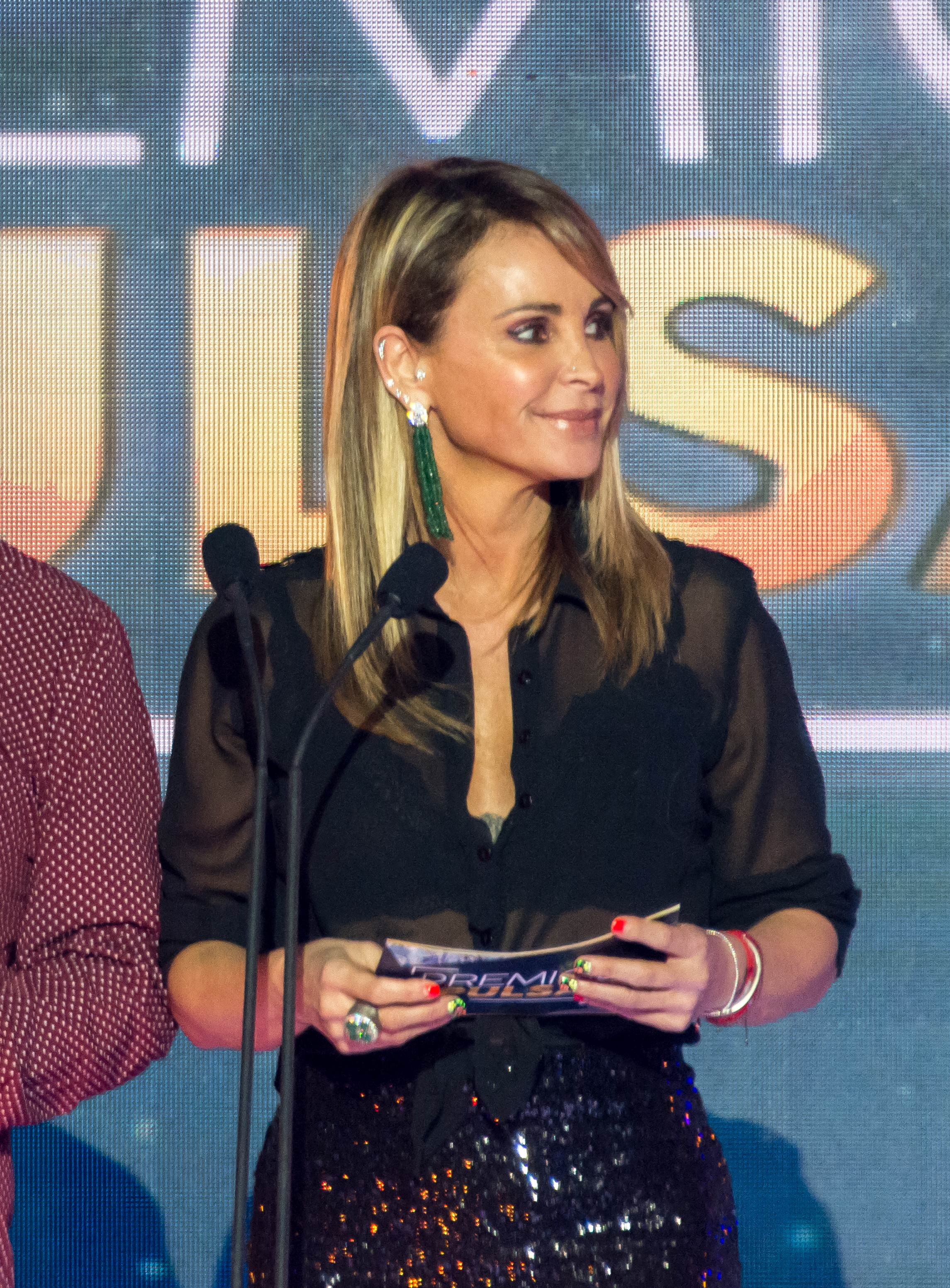 Eva Gómez, Premios Pulsar 2019, Teatro Teletón, Santiago, Región Metropolitana, Chile.